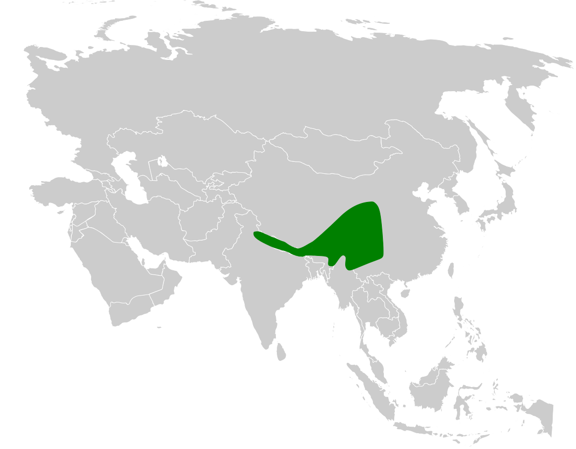 Cettia major distribution map, based on